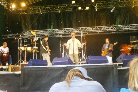 C.V. Jørgensens optræden under GrønTour 98 på Dyrskuepladsen i Horsens den 30. maj 1998 kl. 15.00.